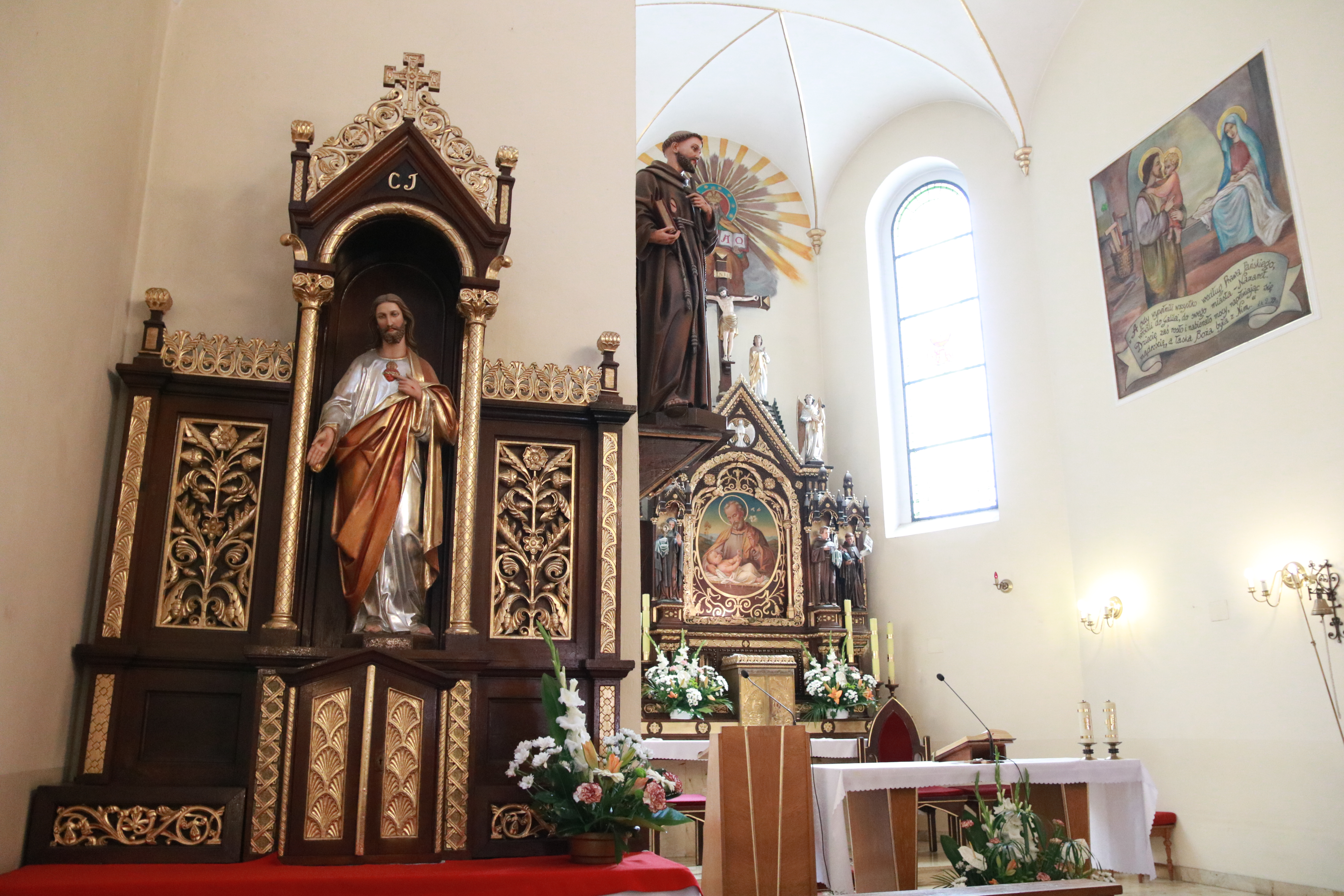 Uroczystość odpustowe NMP Anielskiej z Porcjunkuli-Sanktuarium św. Józefa w Prudniku-Lesie | Abp Marek Jędraszewski | 5.08.2018